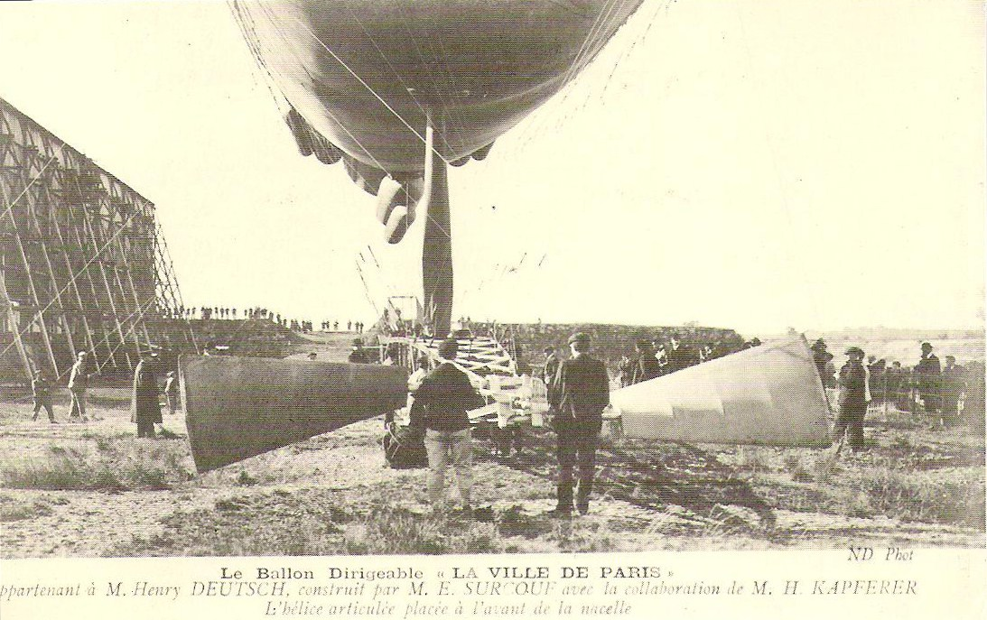 Ville de Paris aérostat .